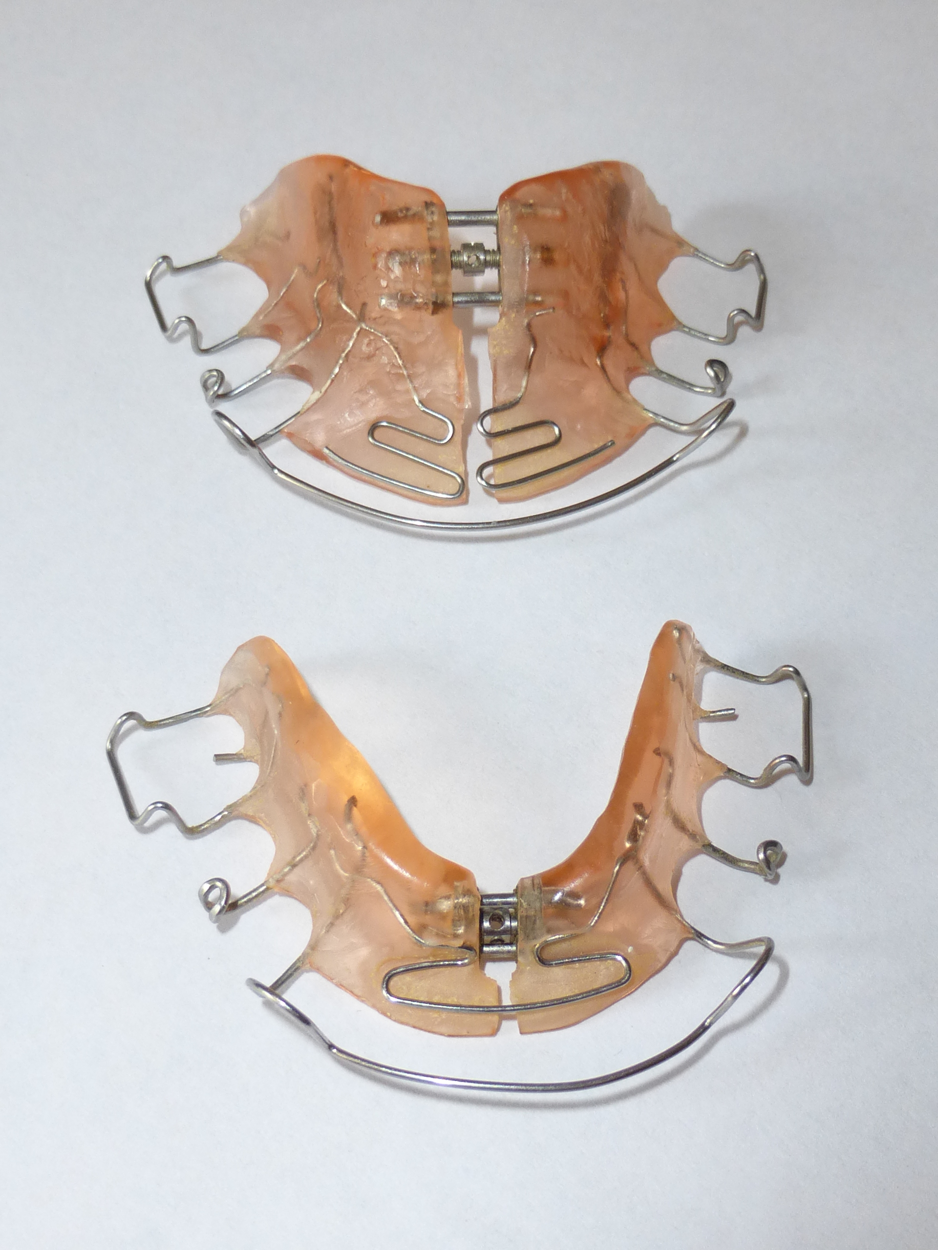 Herausnehmbare verstellbare Zahnspangen ("Aktive Platte") für Oberkiefer (hinten) und Unterkiefer (vorne), 1980er Jahre